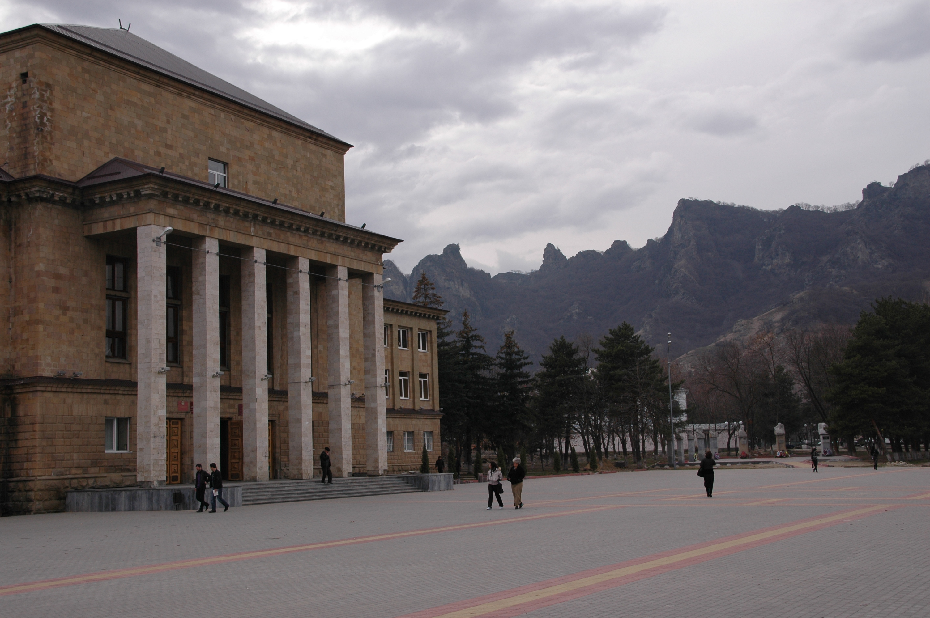 Plac ratuszowy w Karaczajewsku, Północny Kaukaz, Rosja